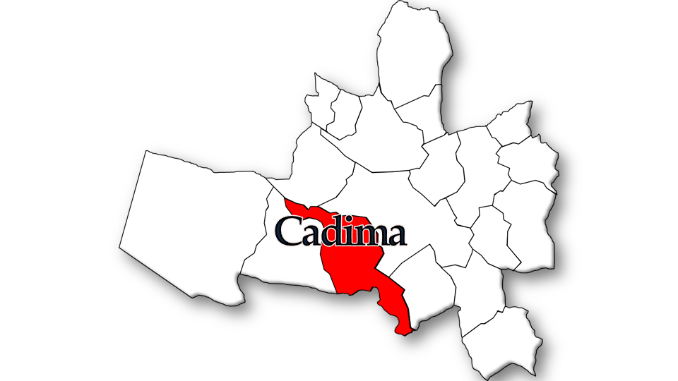 Português